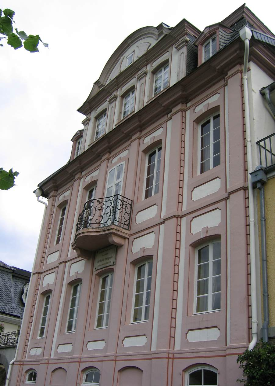 Freiligrathhaus in Unkel. Ferdinand Freiligrath wohnte 1839/40 in Unkel